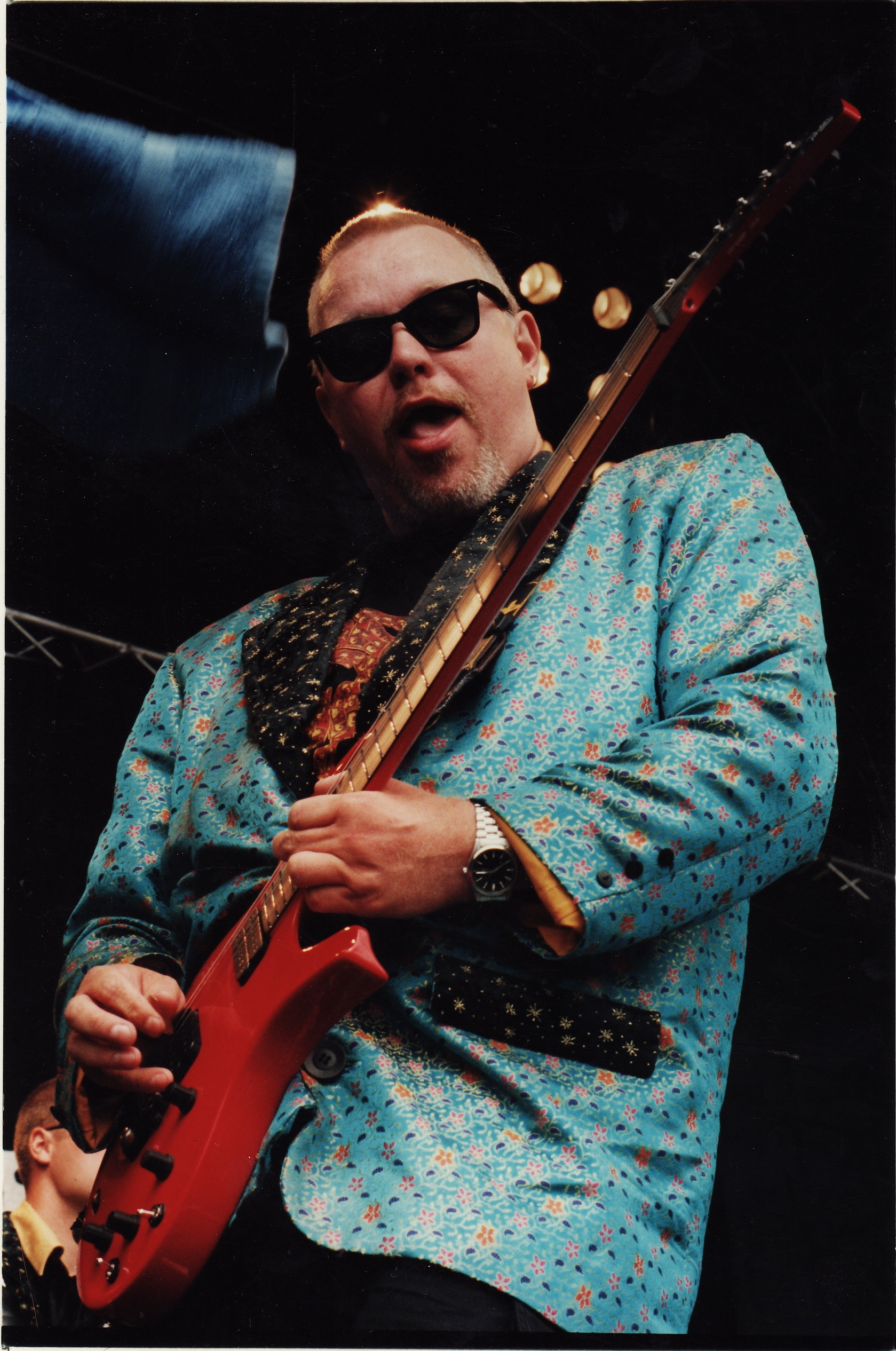 Med Østkyst Hustlers på Grøn Koncert i 1997